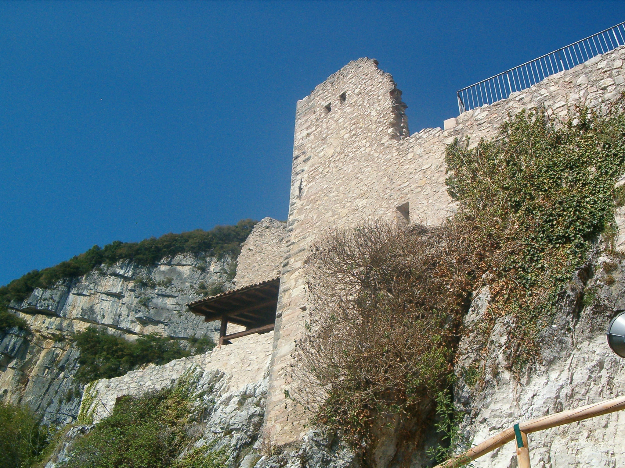 Immagine di Castel Corno nei pressi di Lenzima, frazione di Isera, dell'agosto 2007